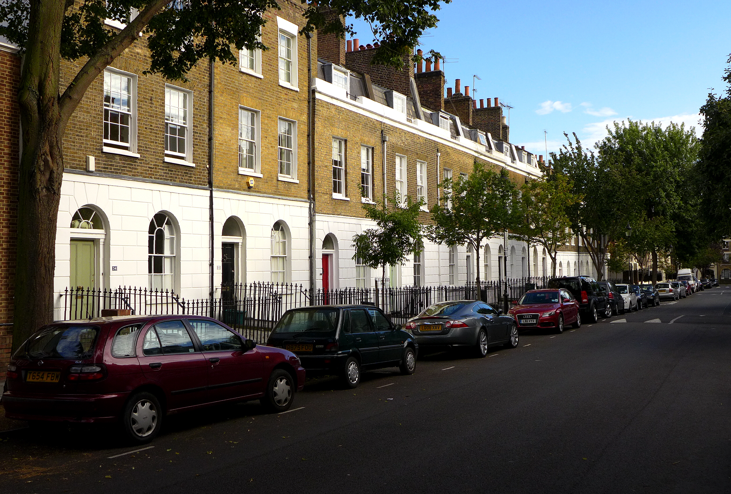 Reihenhäuser im College Cross, Stadtteil Islington, London.